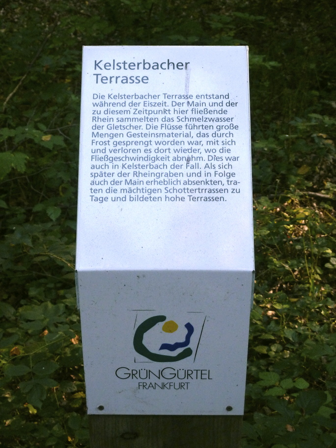 Frankfurt am Main, Bundesland Hessen: Die Kelsterbacher Terrasse ist eine acht Kilometer lange und bis zu 17 m hohe Geländestufe im Frankfurter Stadtwald. Die in west-östlicher Richtung verlaufende und nach Norden hin mäßig steil abfallende Terrasse ist eine Abbruchkante des Main-Urstromtals aus dem Erdzeitalter Pliozän. Sie beginnt im Westen am Mainufer in der Stadt Kelsterbach, durchläuft den Schwanheimer Wald und endet südlich des Frankfurter Stadtteils Niederrad. Das Foto zeigt eine Infotafel des Frankfurter Grüngürtels am nördlichen Fuß der Terrasse, mit Details zu deren Geschichte